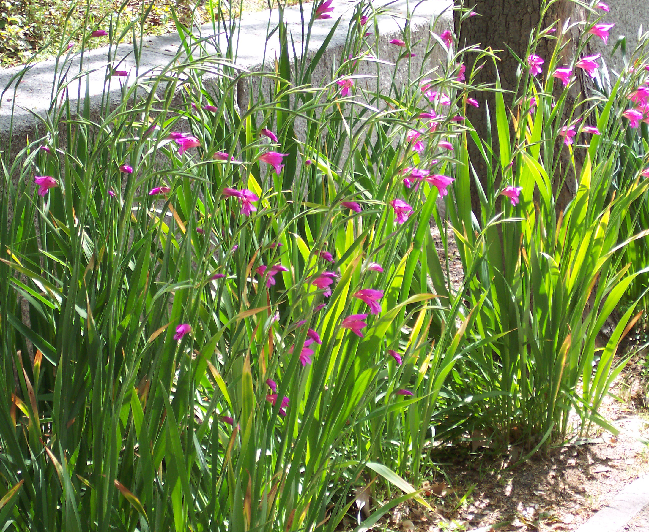 Gladiolus communis. Real Jardín Botánico, Madrid.